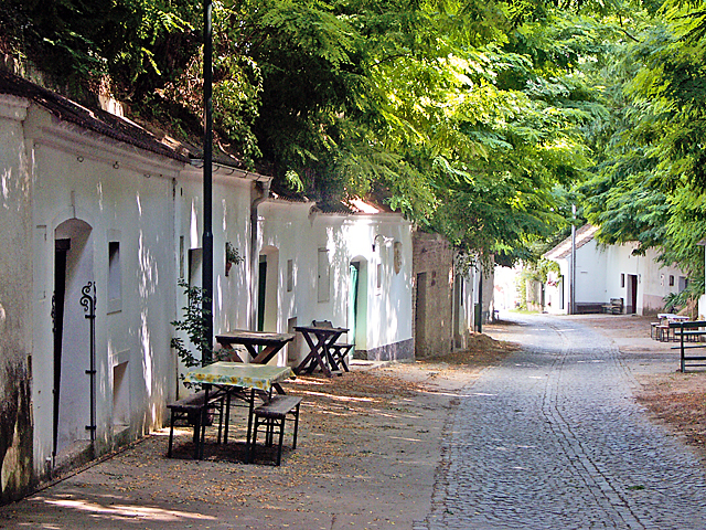 vinkela strateto de Posydorf en la regiono Weinviertel de Aŭstrio